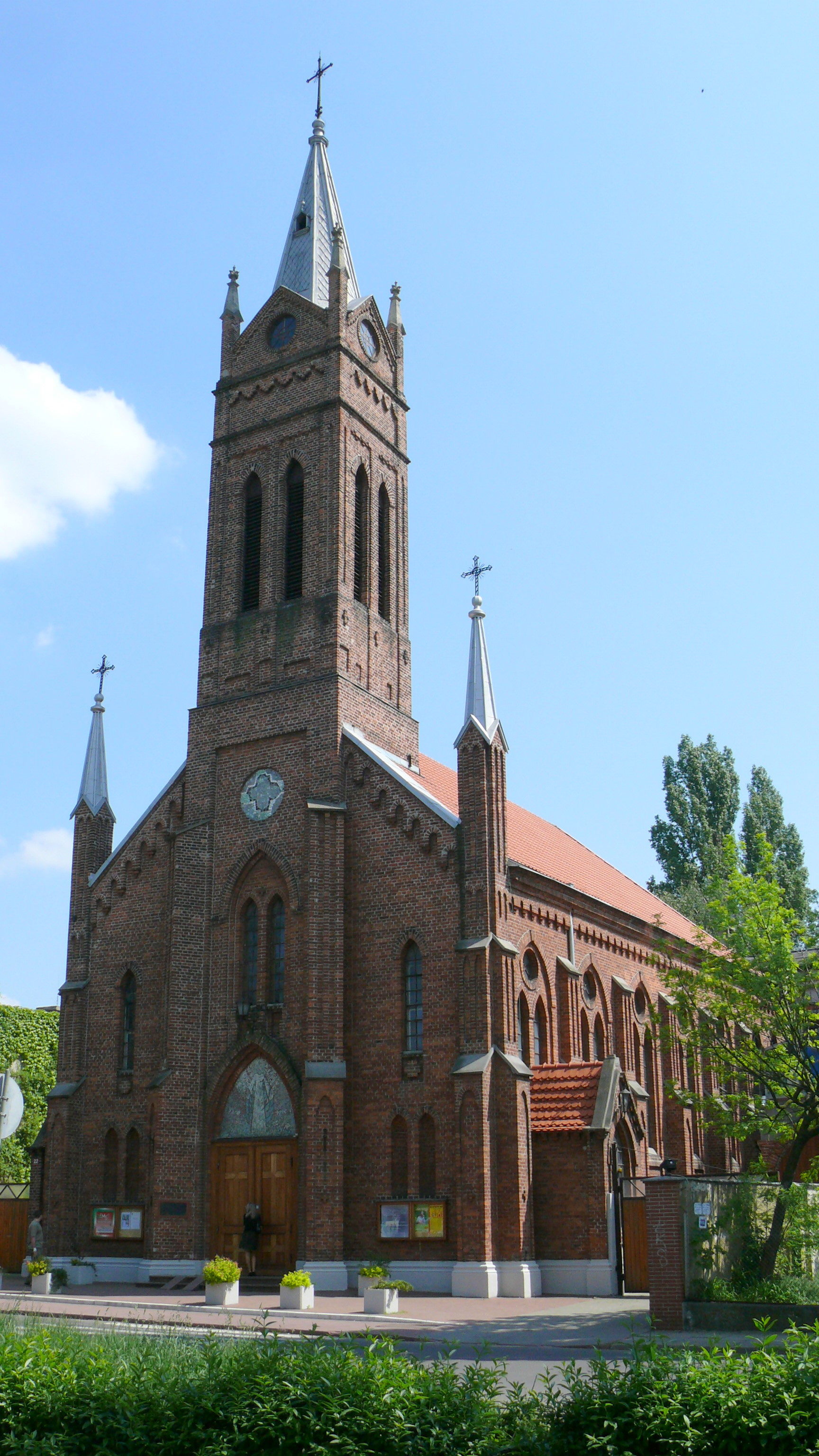 Kościół Niepokalanego Poczęcia NMP ul. M. Skłodowskiej-Curie 22 w Łodzi